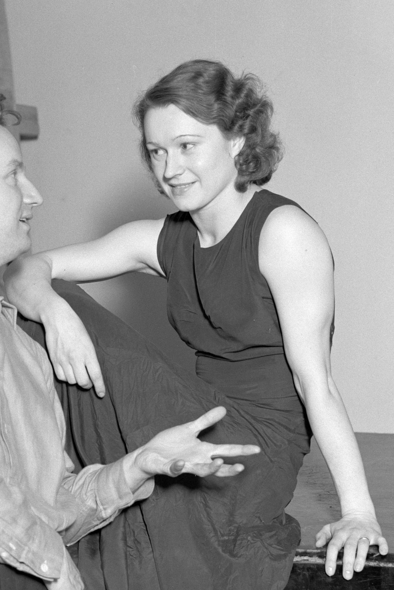 Eerste ballerina Loda Halama oefent met Jan Cieplinski, balletmeester van de Opera van Warschau in Teatr Wielki